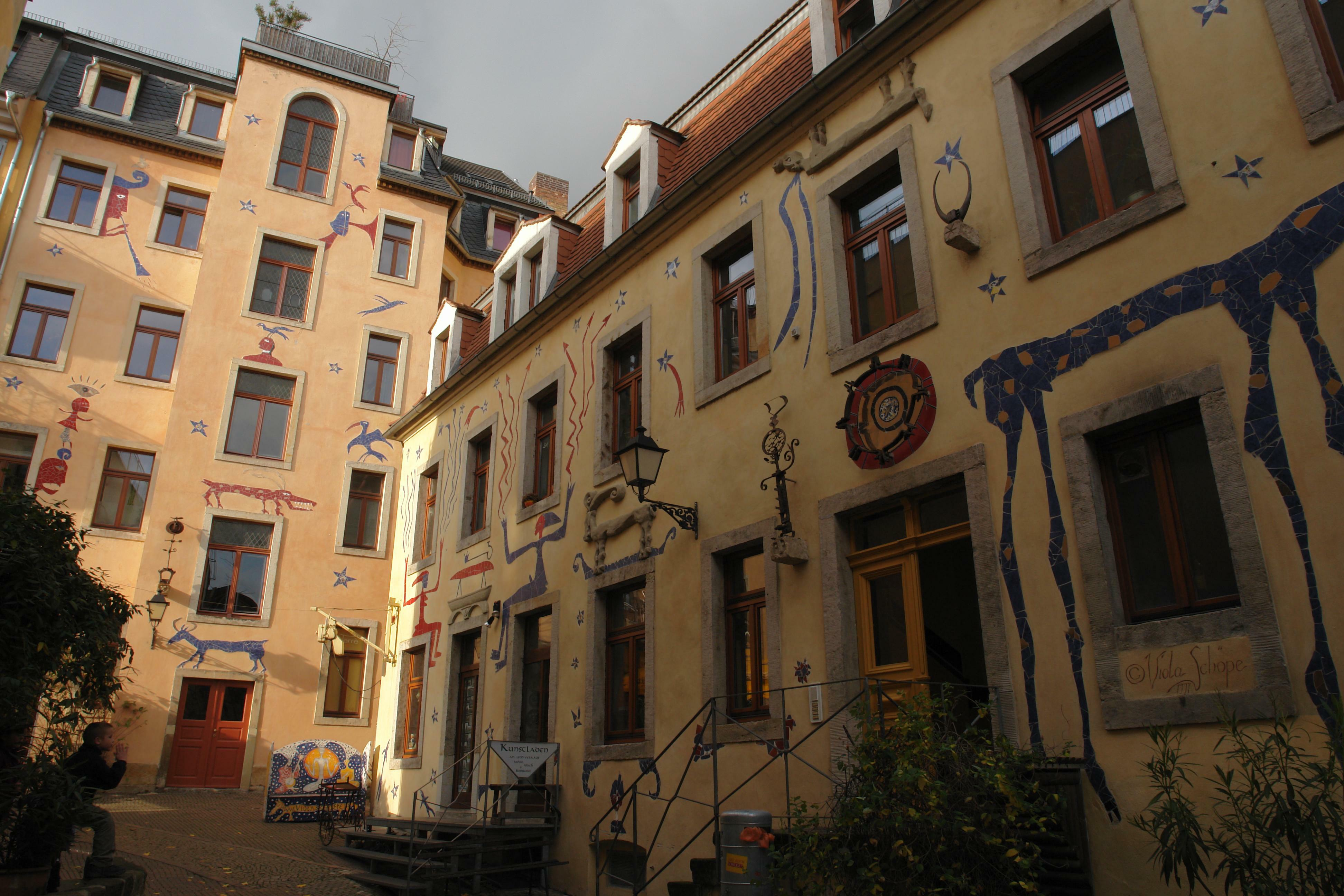 Hof der Fabelwesen im Kunsthof der Dresdner Neustadt